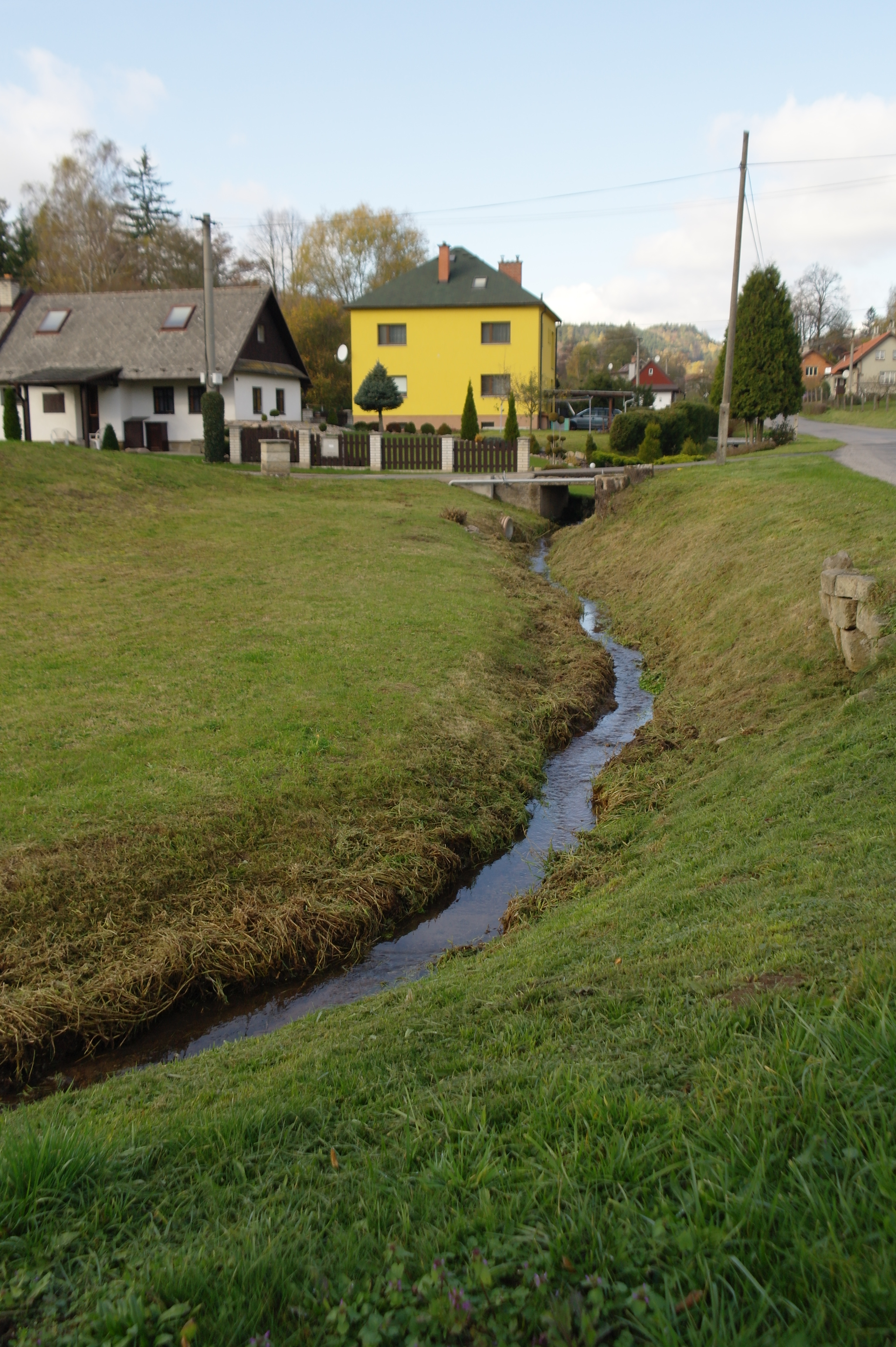 Potok ve vesnici Hnátnice v Pardubickém kraji Project: Fotíme Česko